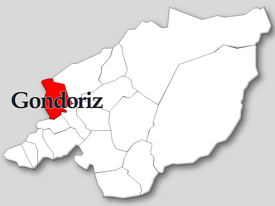 Censos 1864/2011